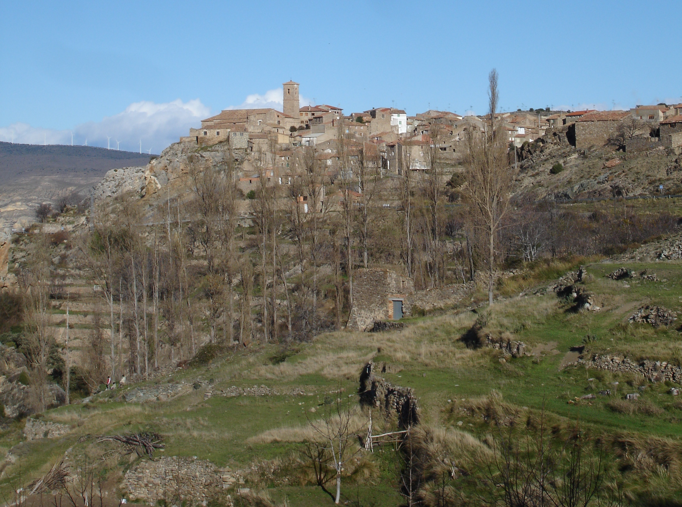 Vista de San Felices (provincia de Soria) desde la carretera